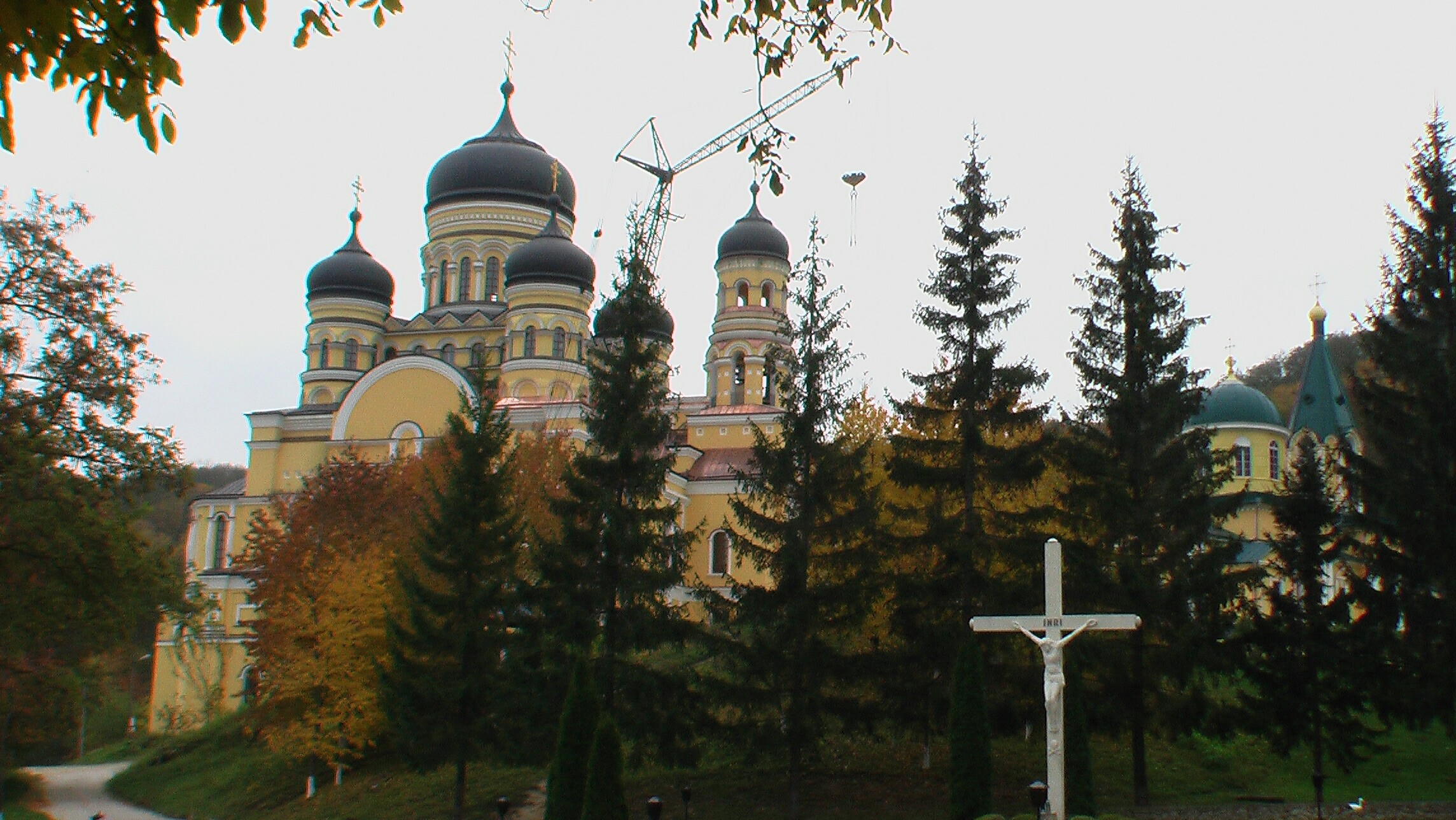 MoldawienKlosterHincu2